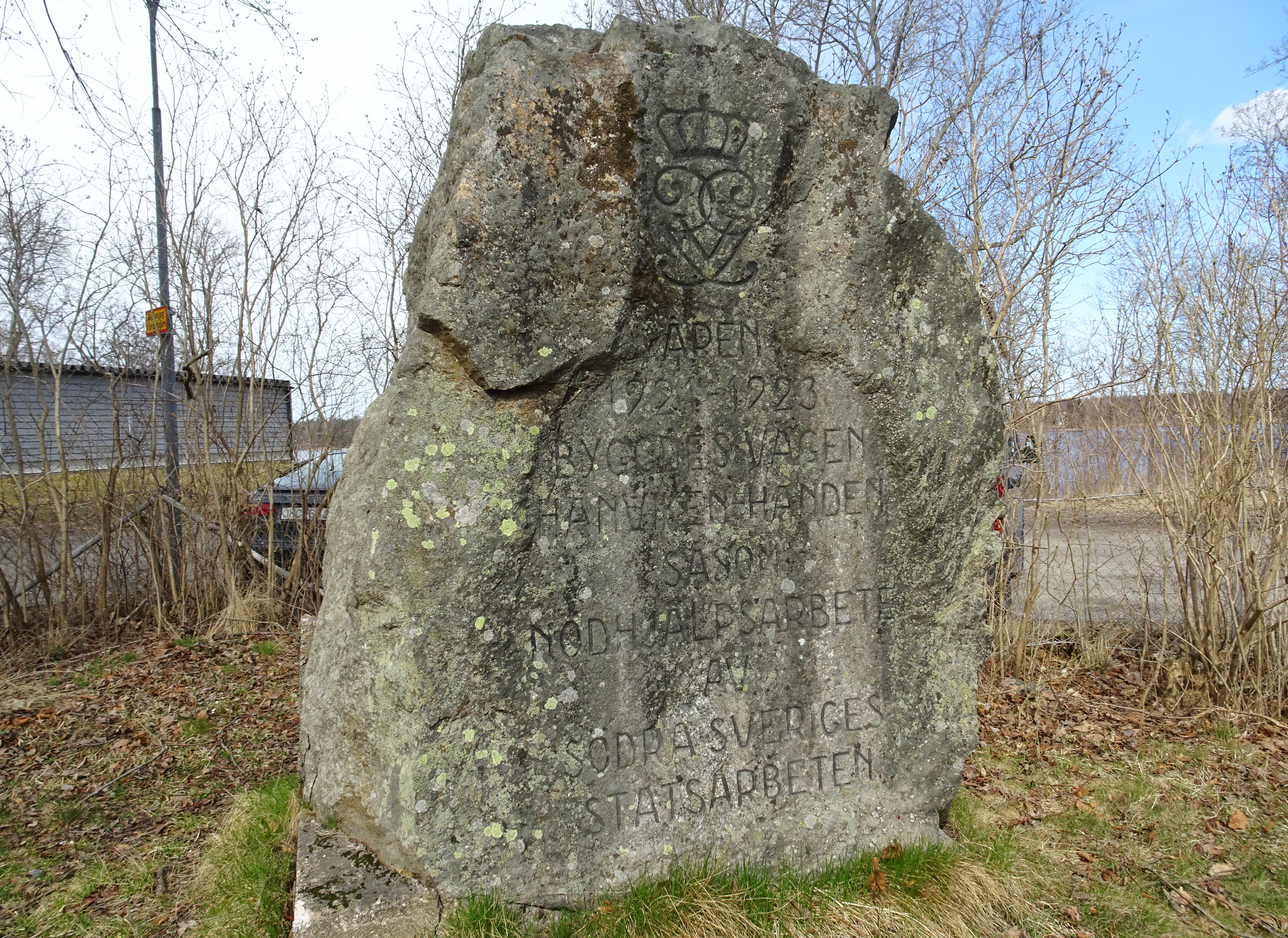 Minnessten bakom Vendelsö gårds flygel. ÅREN 1922-1928 BYGGDES VÄGEN HANVIKEN-HANDEN SÅSOM NÖDHJÄLPARBETE AV SÖDRA SVERIGES STATSARBETEN